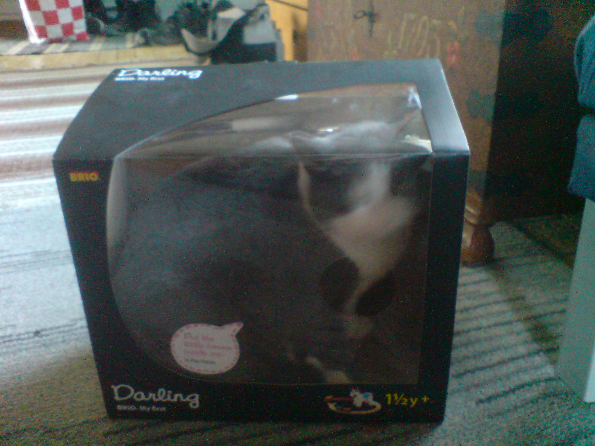 Humour sur les Chaton bonsaï.